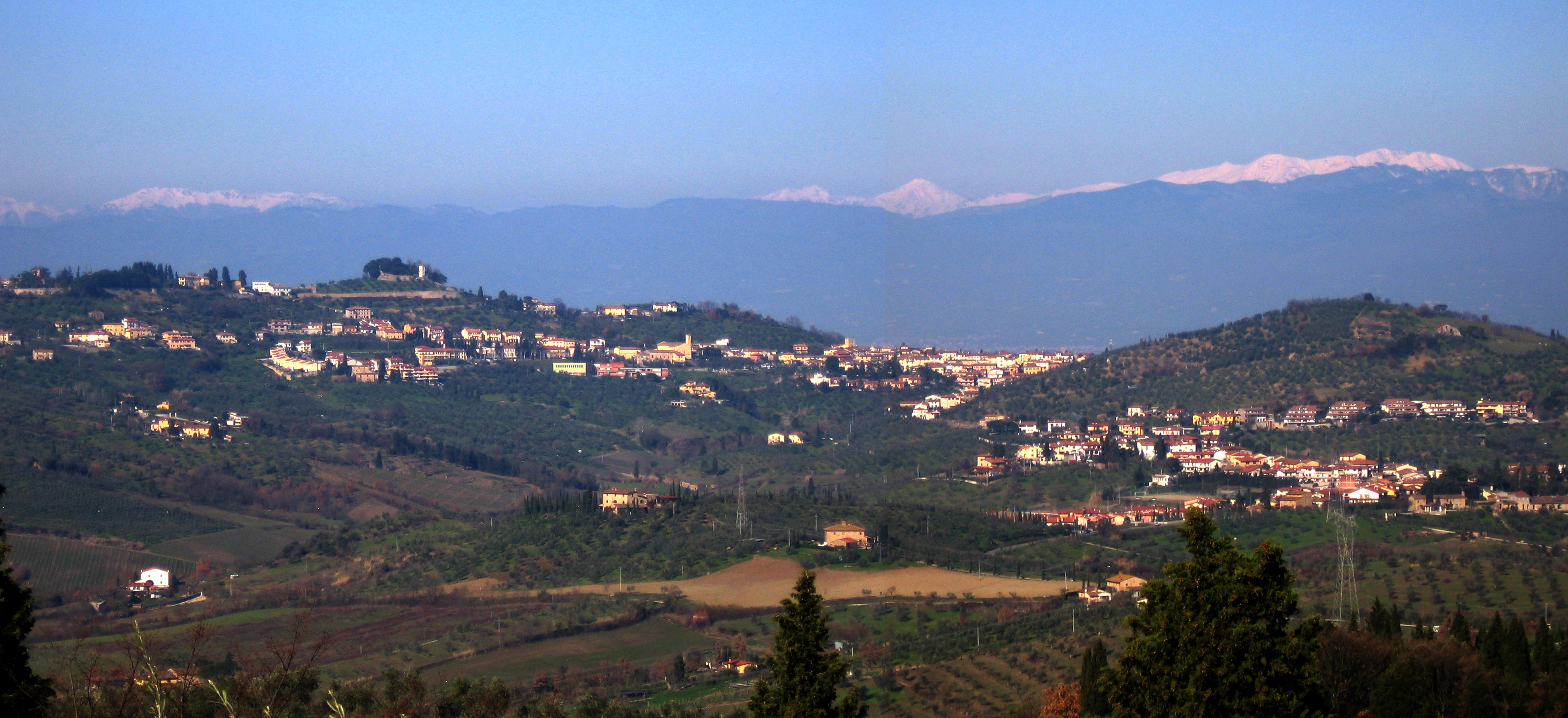 Vista di Carmignano dalla strada che scende da Artimino verso Poggio a Caiano appena sotto la villa Medicea.